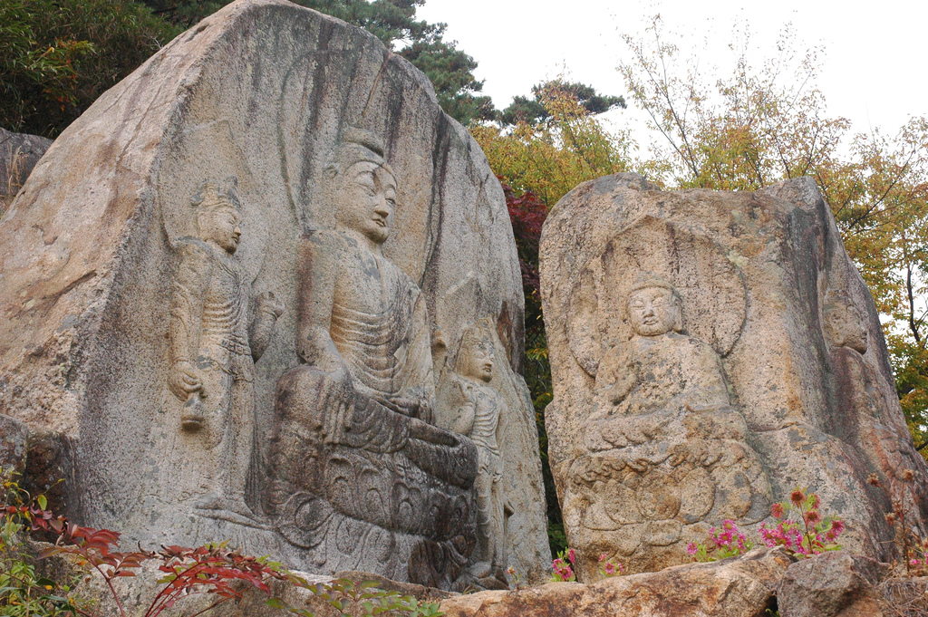 Chilbulam in Namsan(Mt. Namsan), Gyeongju, Gyeongsangnam-do, South Korea